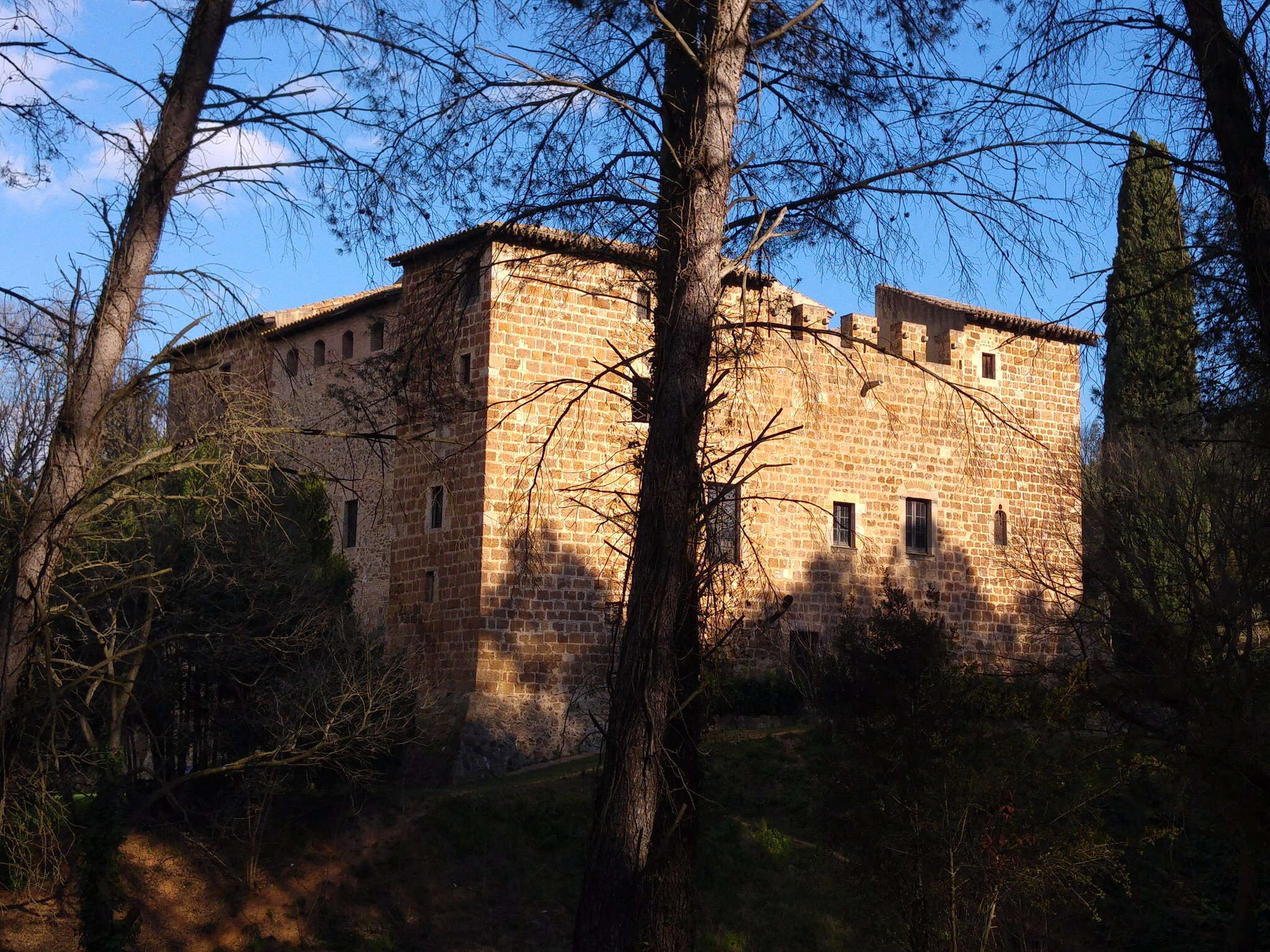 Torre Negra (Sant Cugat del Vallès)